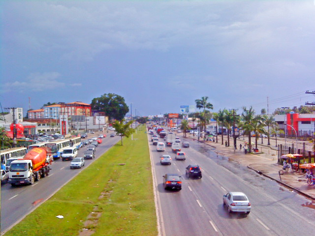 Rodovia BR-316 atravessando o município de Ananindeua, na Região Metropolitana de Belém, estado do Pará